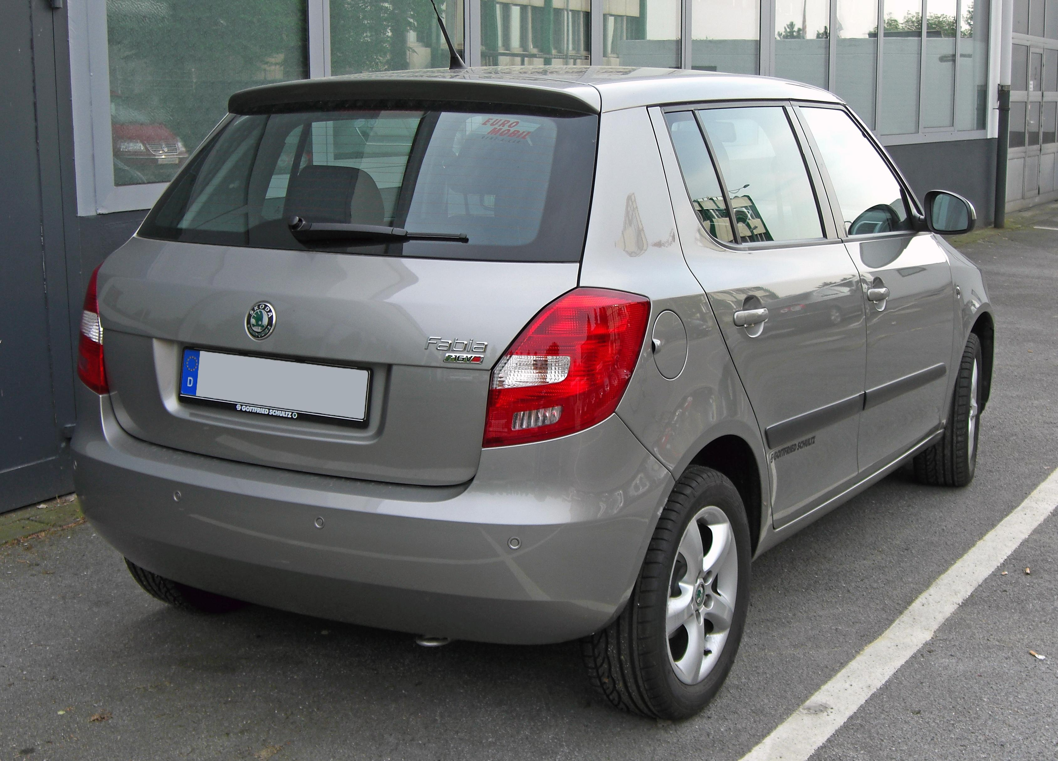 Skoda Fabia II